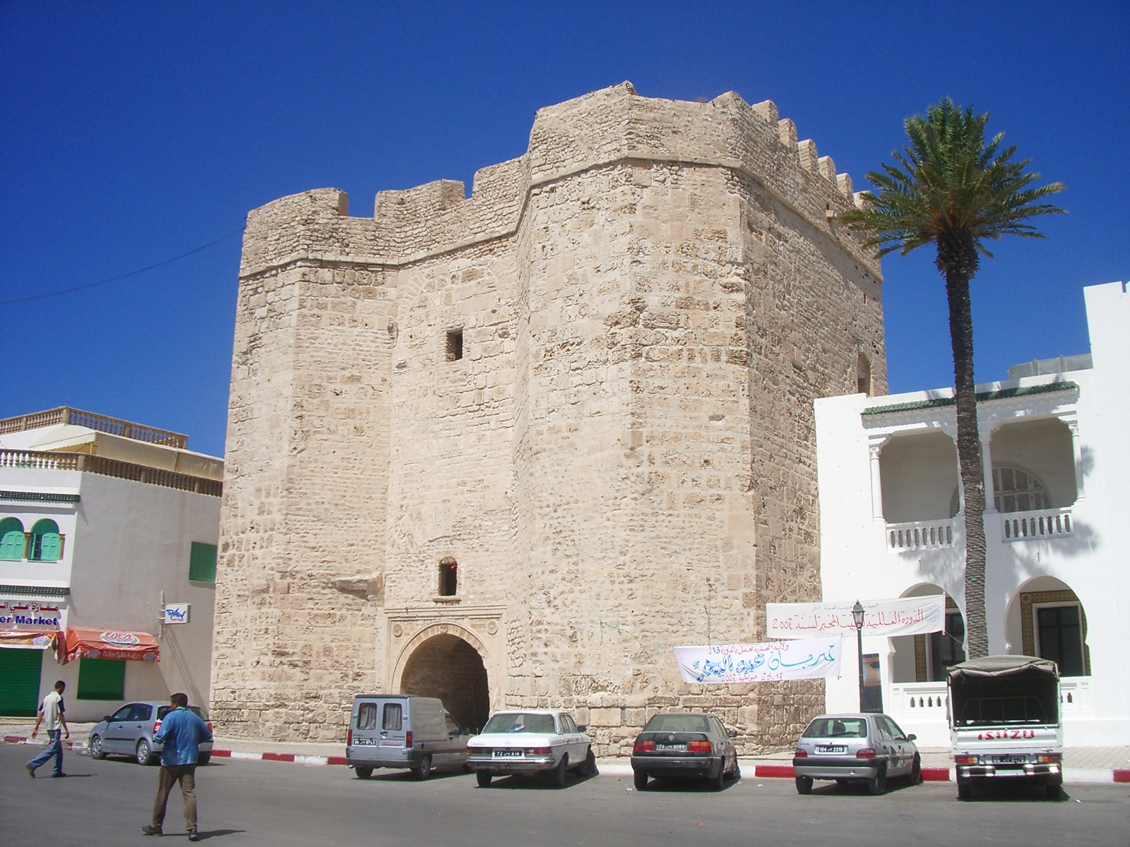 Skifa kala